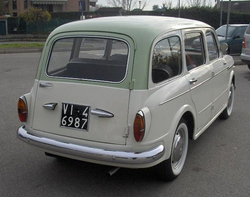 Fiat 1100 103 D Familiare del 1960